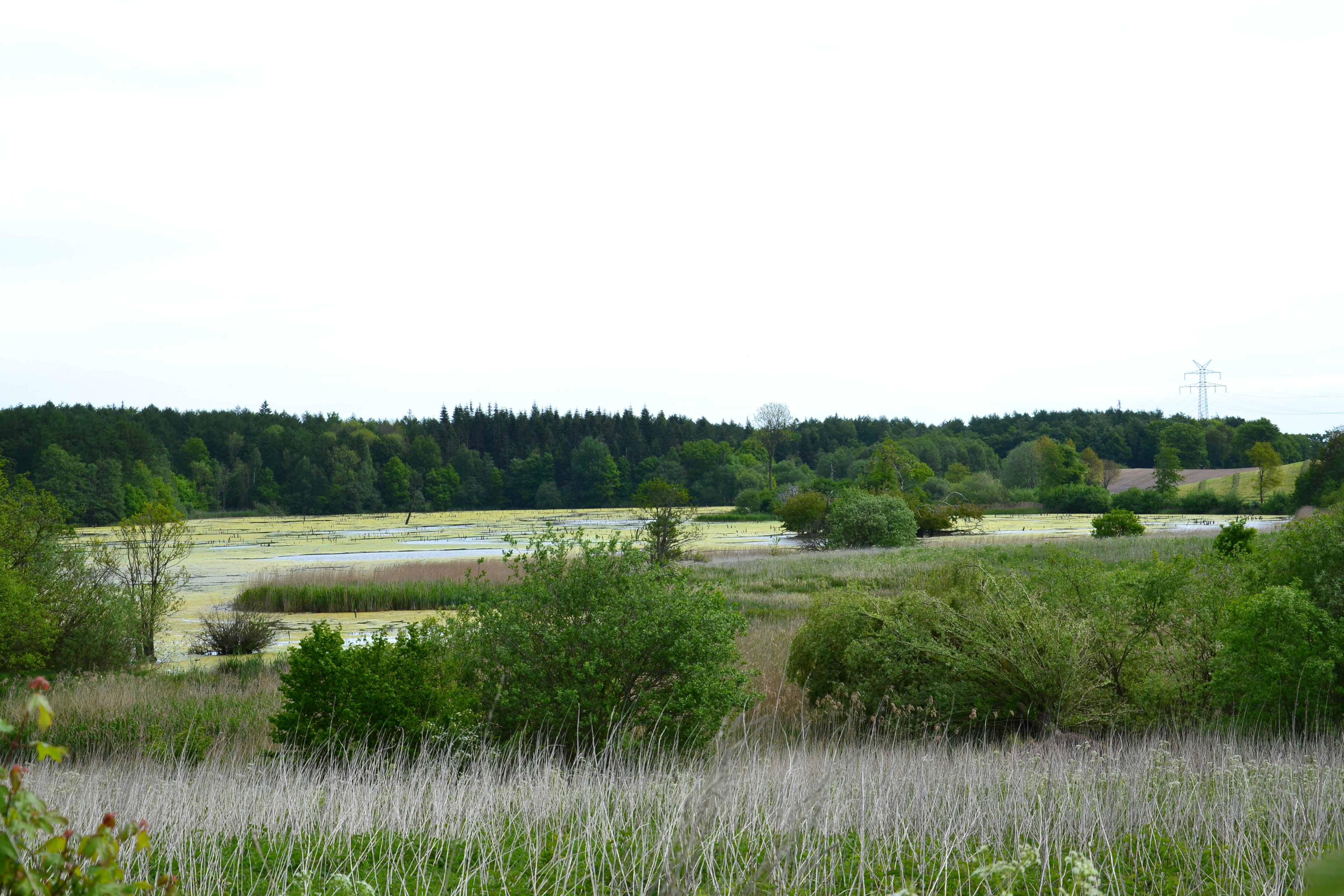 Überschwemmungswiesen Jägerslust, Kreis Rendsburg-Eckernförde, Blick aus westlicher Richtung (NSG Nr. 107 SH)